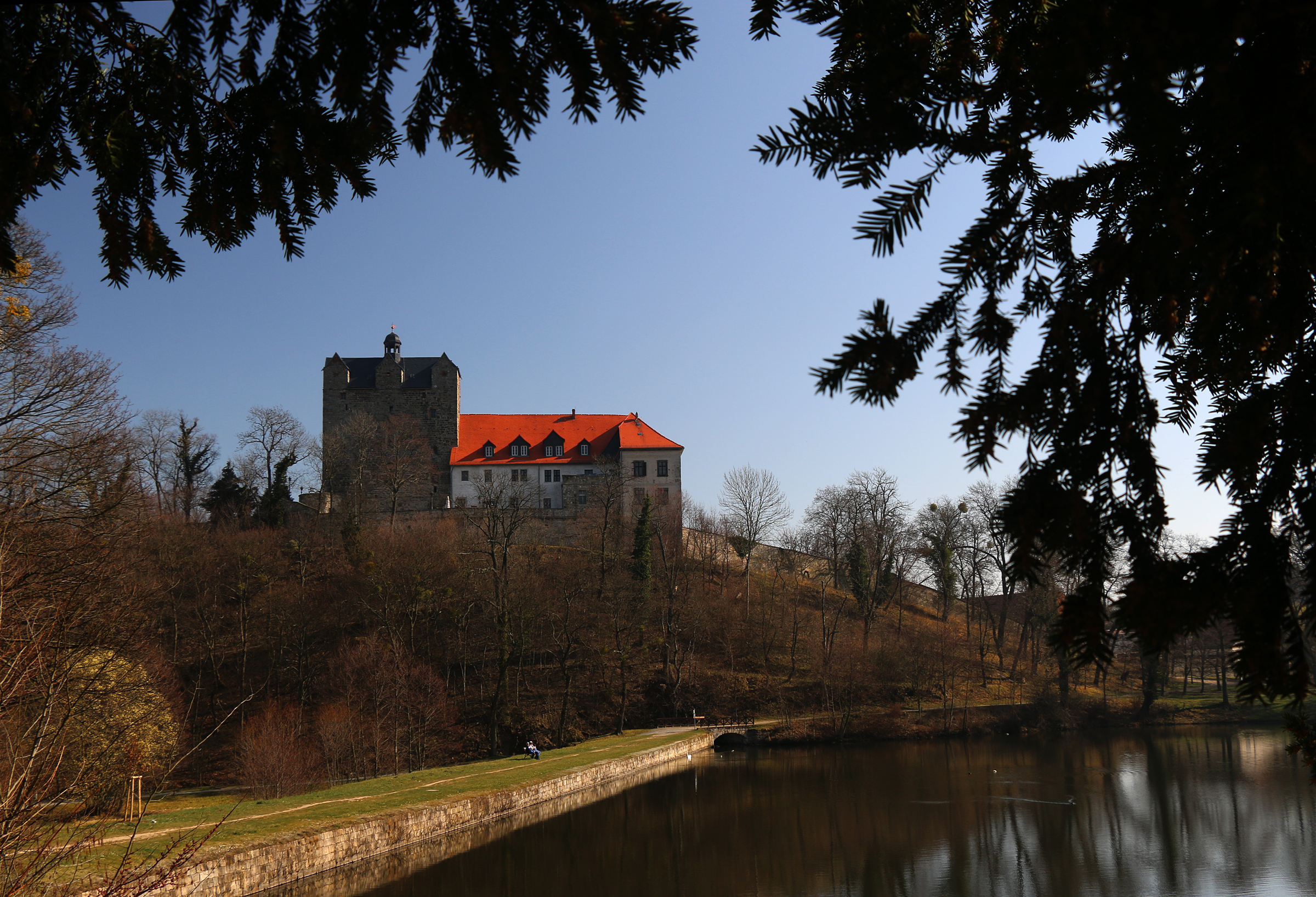 Ansicht des Schlosses Ballenstedt vom Schloßteich aus